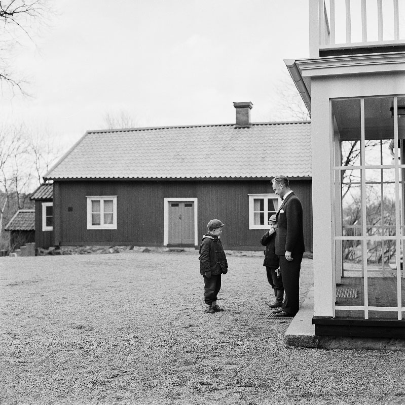 Bild från 21 januari 1957